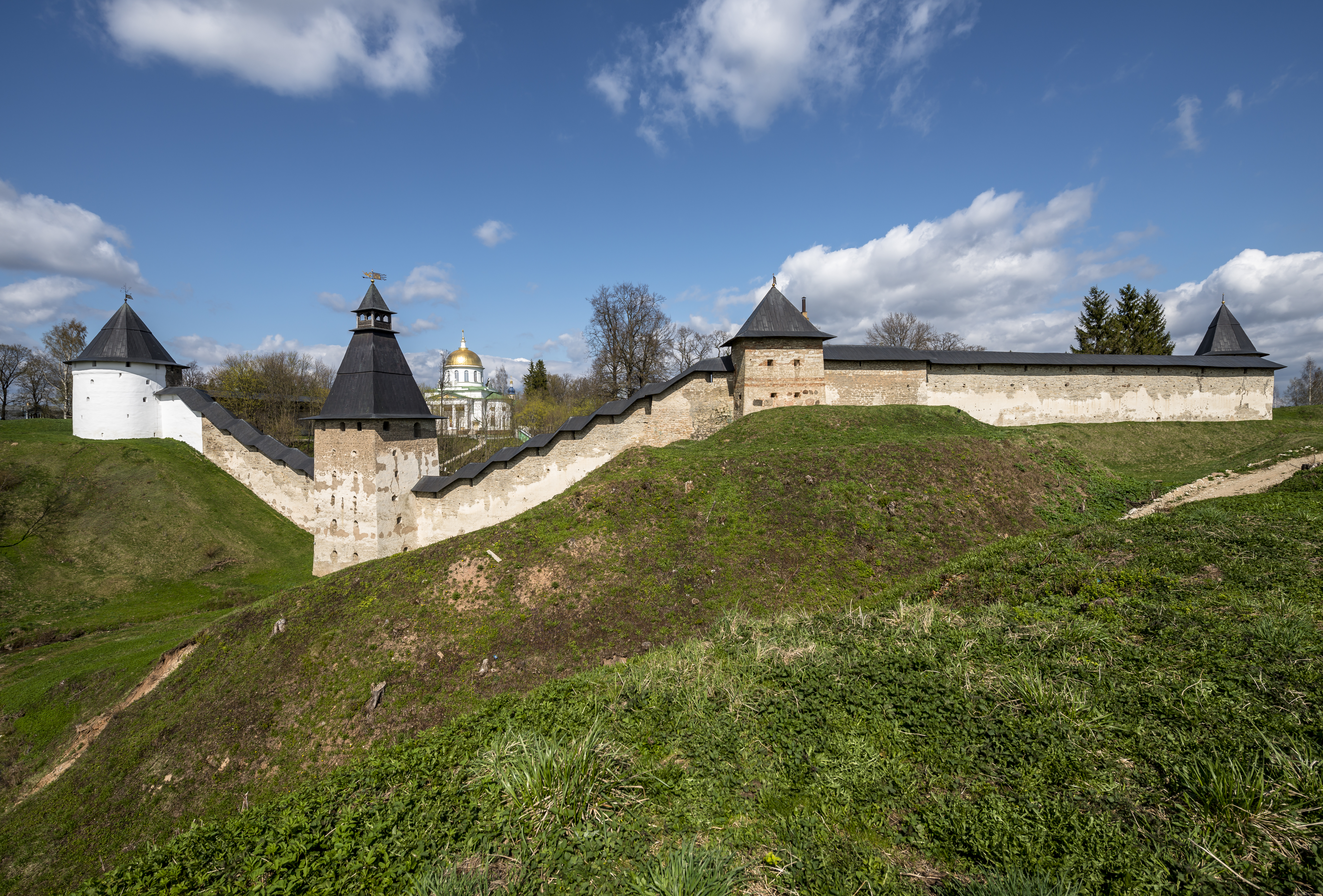 стены и башни: Печоры, Печорский район, Псковская область